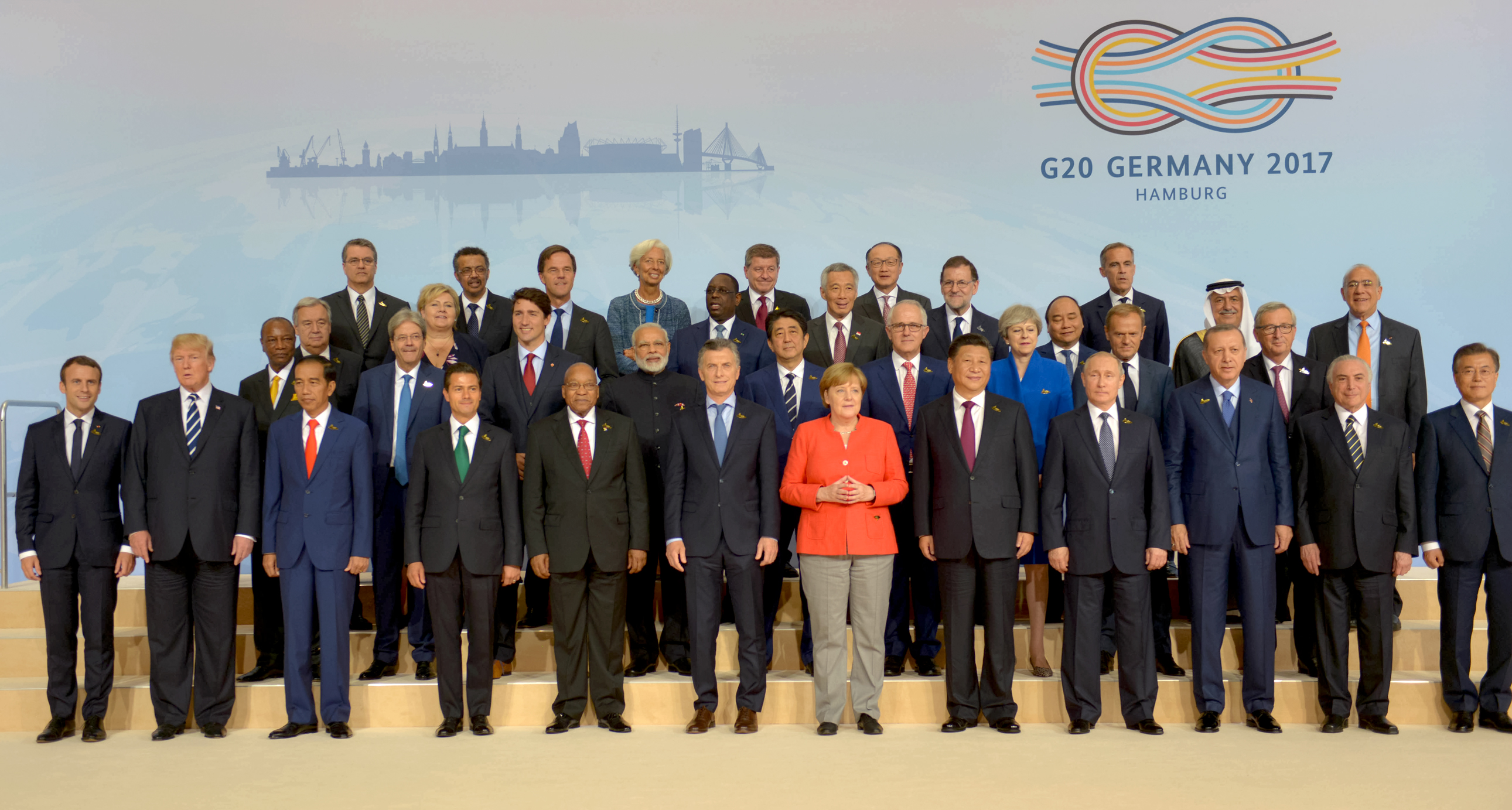 Cumbre de Líderes del G20